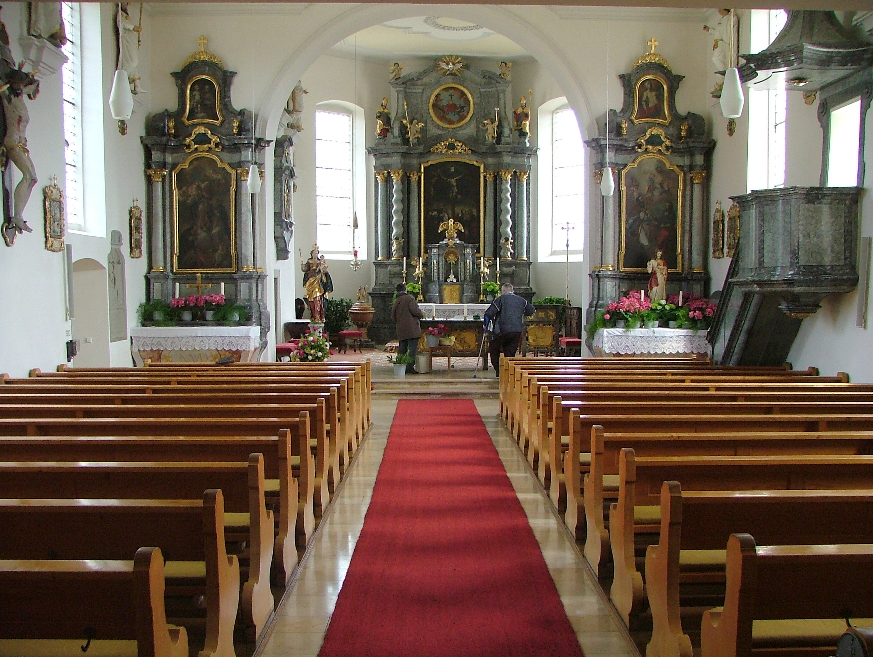 Pfarrkirche St. Ambrosius (innen), Hergensweiler